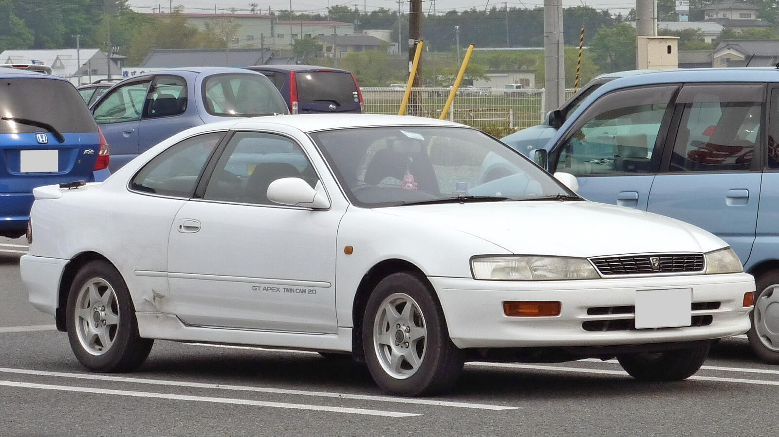 トヨタ・カローラレビン（AE100系）